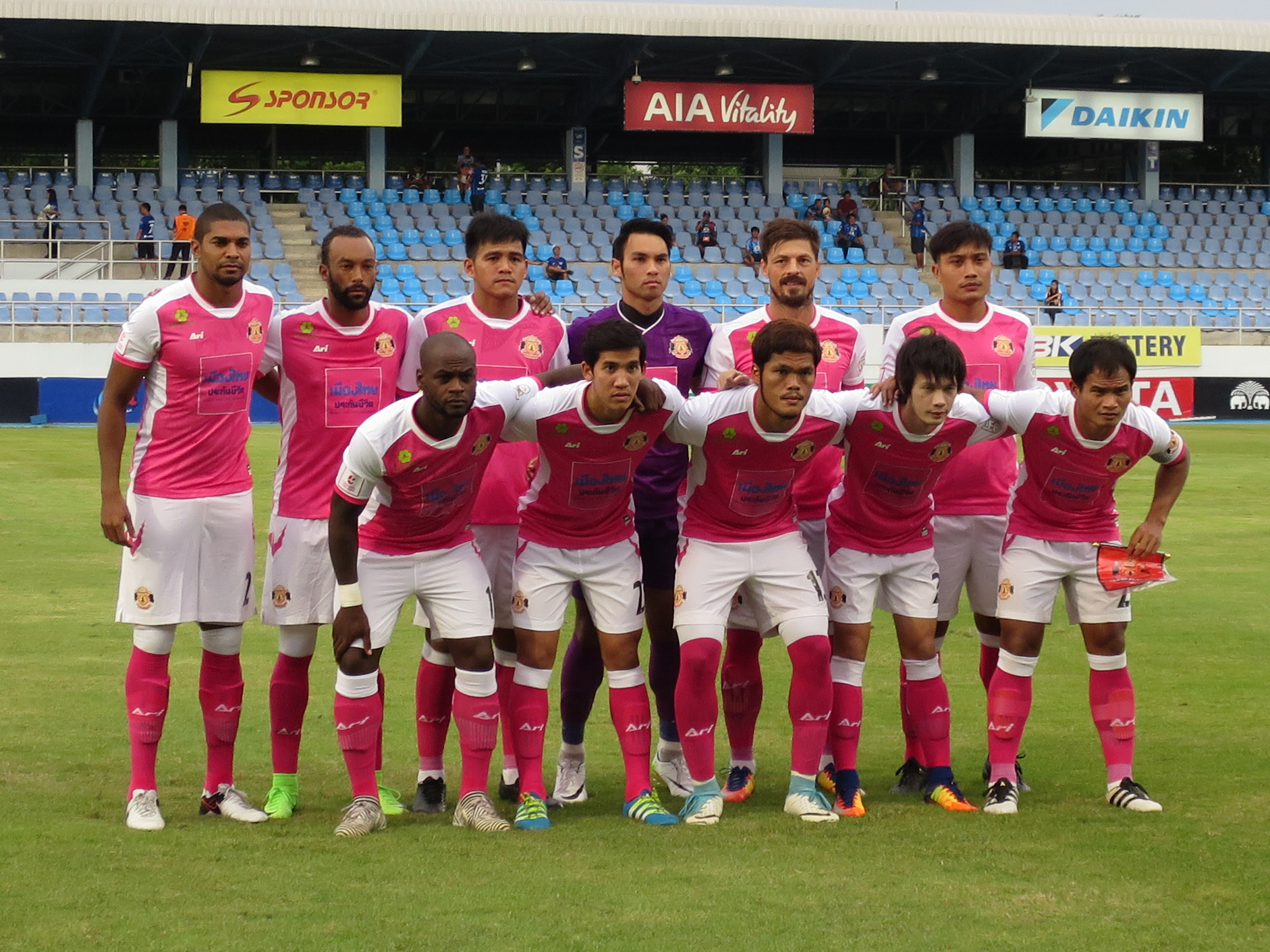 Sisaket FC (2017)